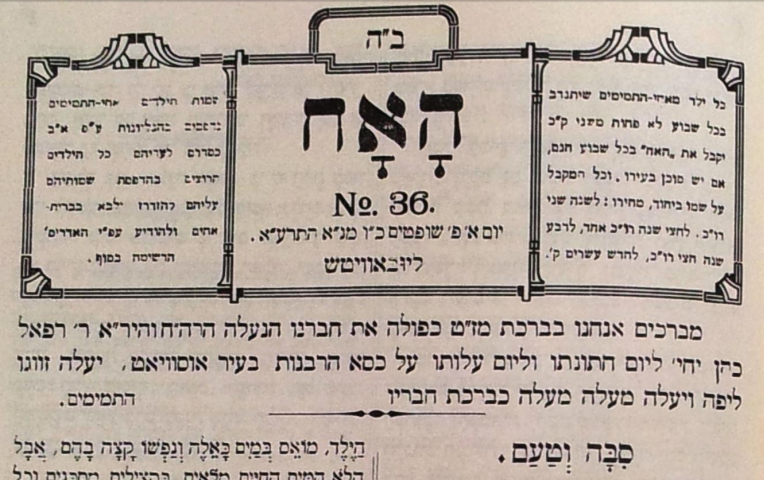 שער עיתון האח